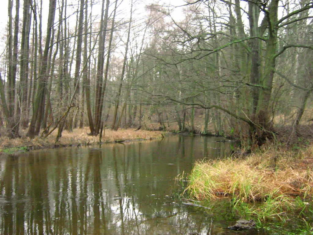 Der Rheinberger Rhin bei Zechow, einem Gemeindeteil der Stadt Rheinsberg. Der Rhin fließt hier nuturbelassen als mäandrierender Wildwasserbach in seinem schmalen Tal. Das Tal ist mit Schwarzerlenwäldern bewachsen, hat jedoch auch als Grünland genutzte Wiesenstücke. Die Flächen jenseits der nicht sehr hohen Flußterrasse sind mit Kiefern-Laubbaum-Mischwald bewaldet. (Landkreis Ostprignitz-Ruppin, Brandenburg)